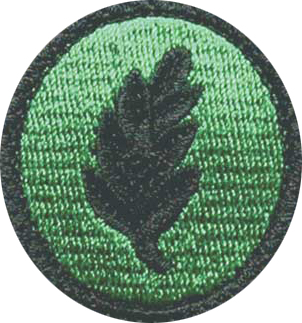 Einzelkämpferabzeichen EK1